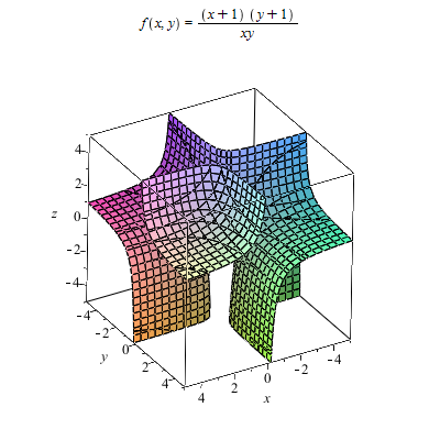 Рациональная функция от двух переменных. Нарисовано в Maple.